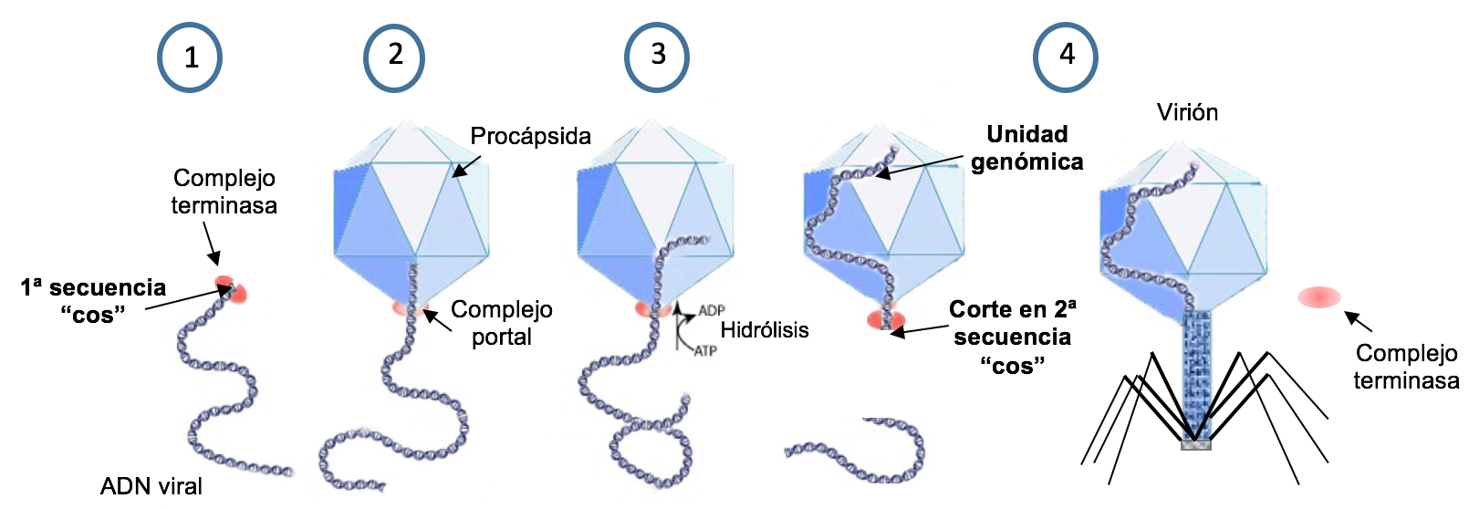 Descripción de la función de la terminasa en la encapsulación específica